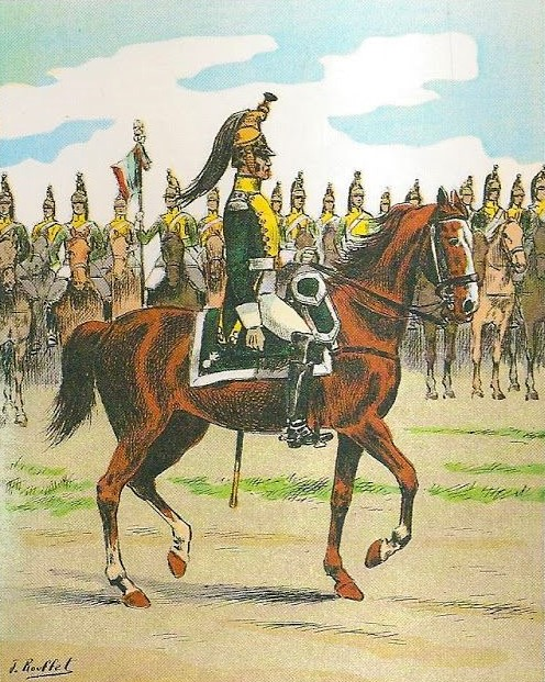 Capitaine du 19e régiment de dragons en grande tenue, 1813. L'habit est conforme au règlement de 1812.